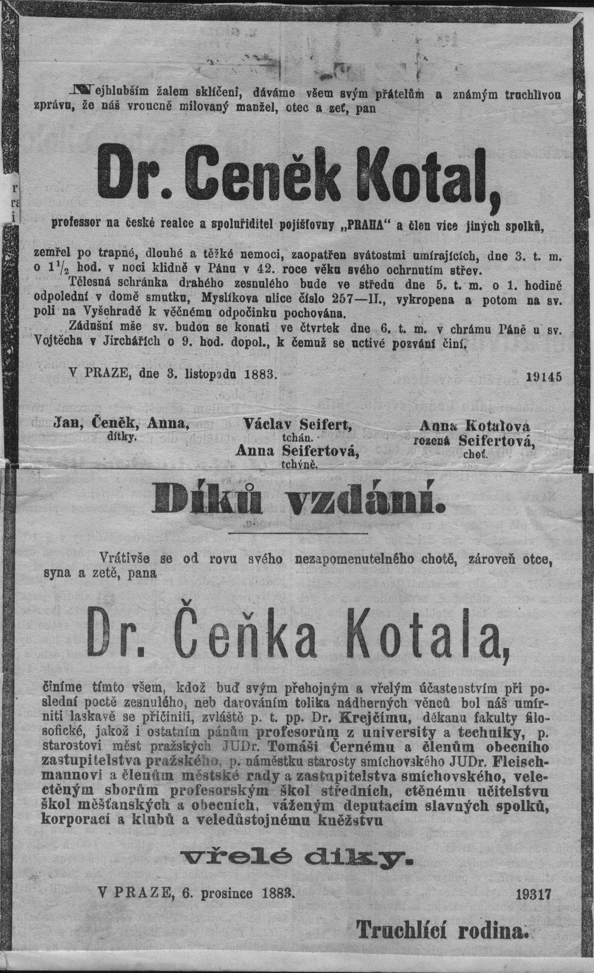 Čeněk Kotal - přírodovědec, parte